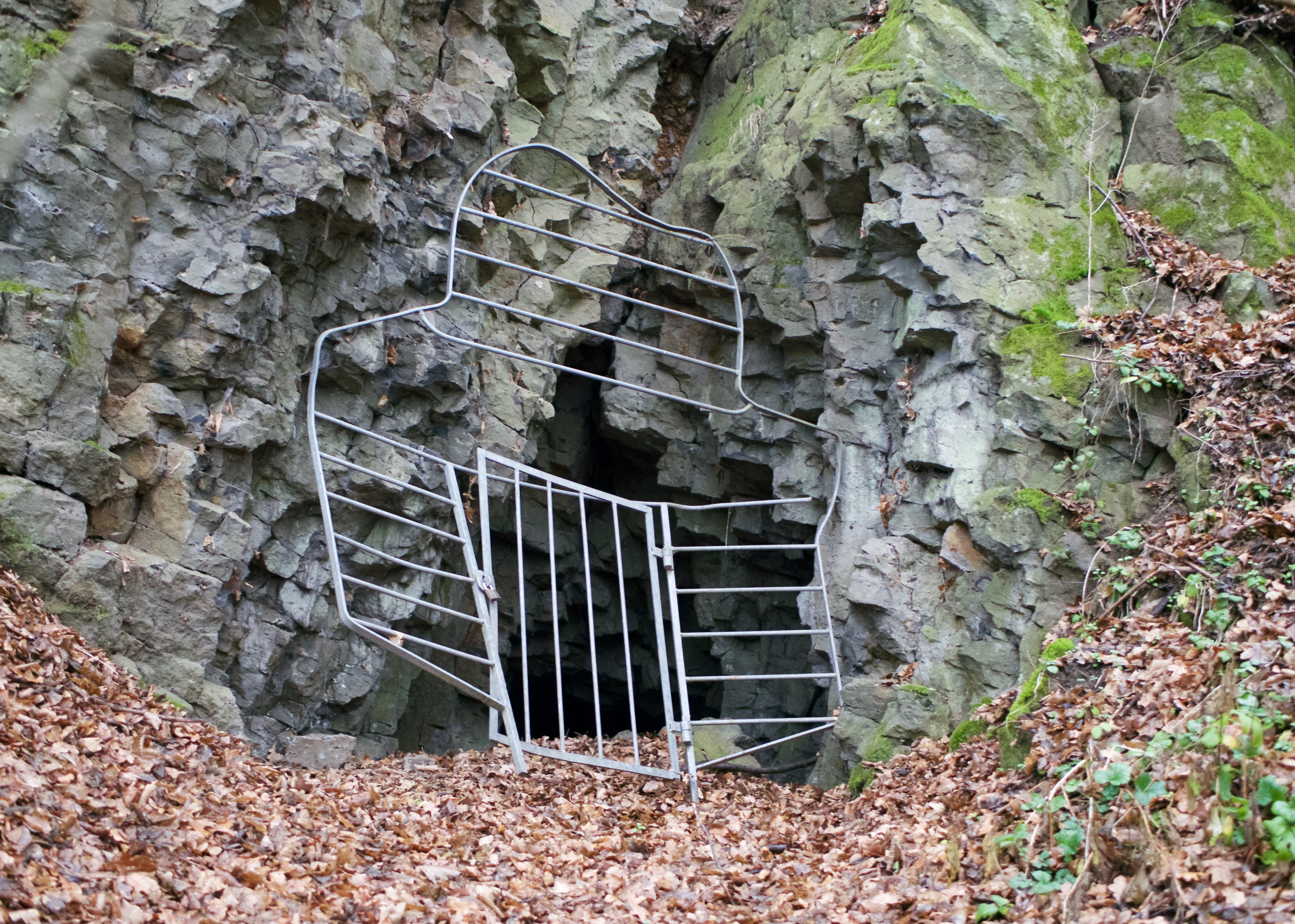 Das Wichtelloch zwischen Ober- und Niedergrenzebach.